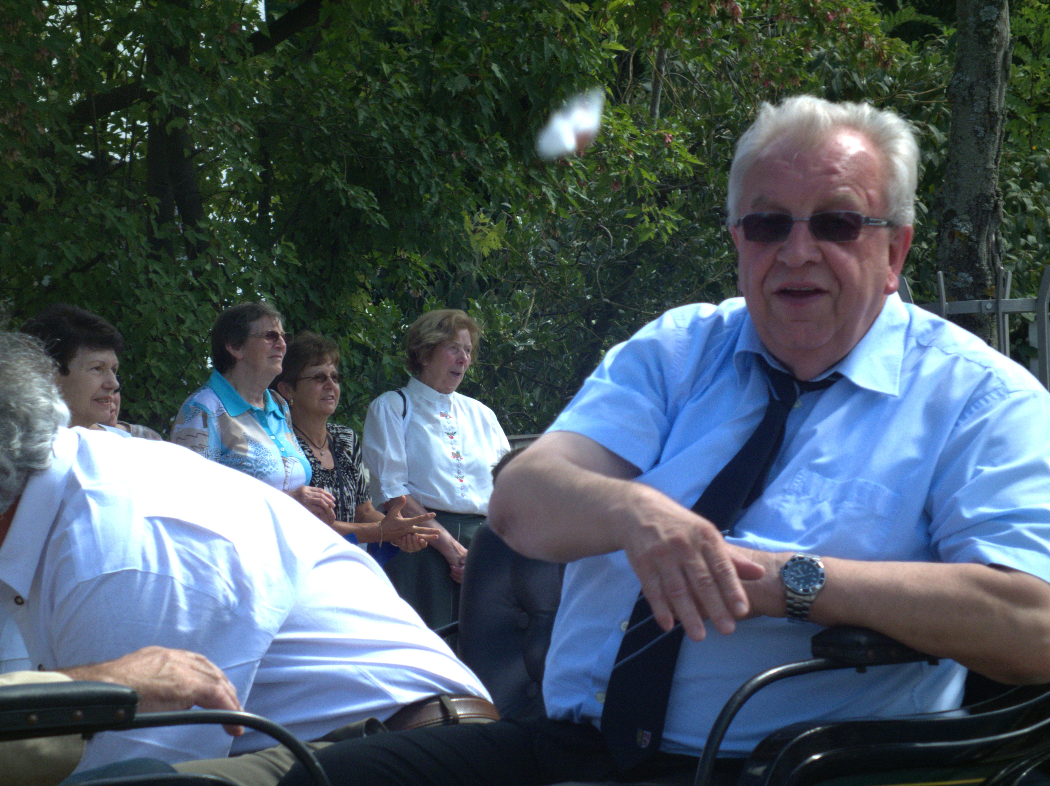 Festumzug am 12. August zum Juravolksfest 2012 in Neumarkt in der Oberpfalz, aufgenommen in der Bahnhofsstraße